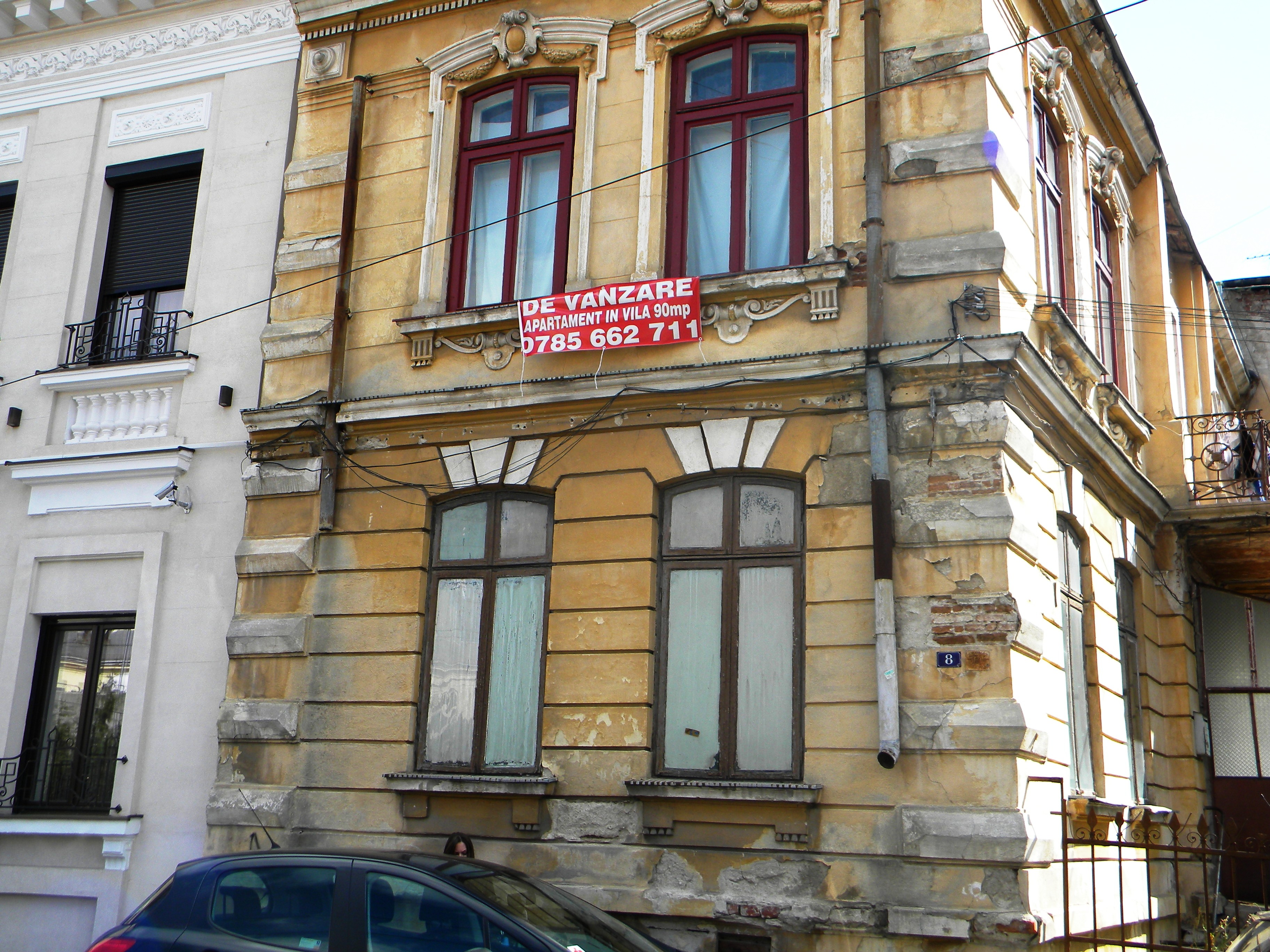 Bucuresti, Romania, Casa pe Str. Slanic nr. 8, sect. 3